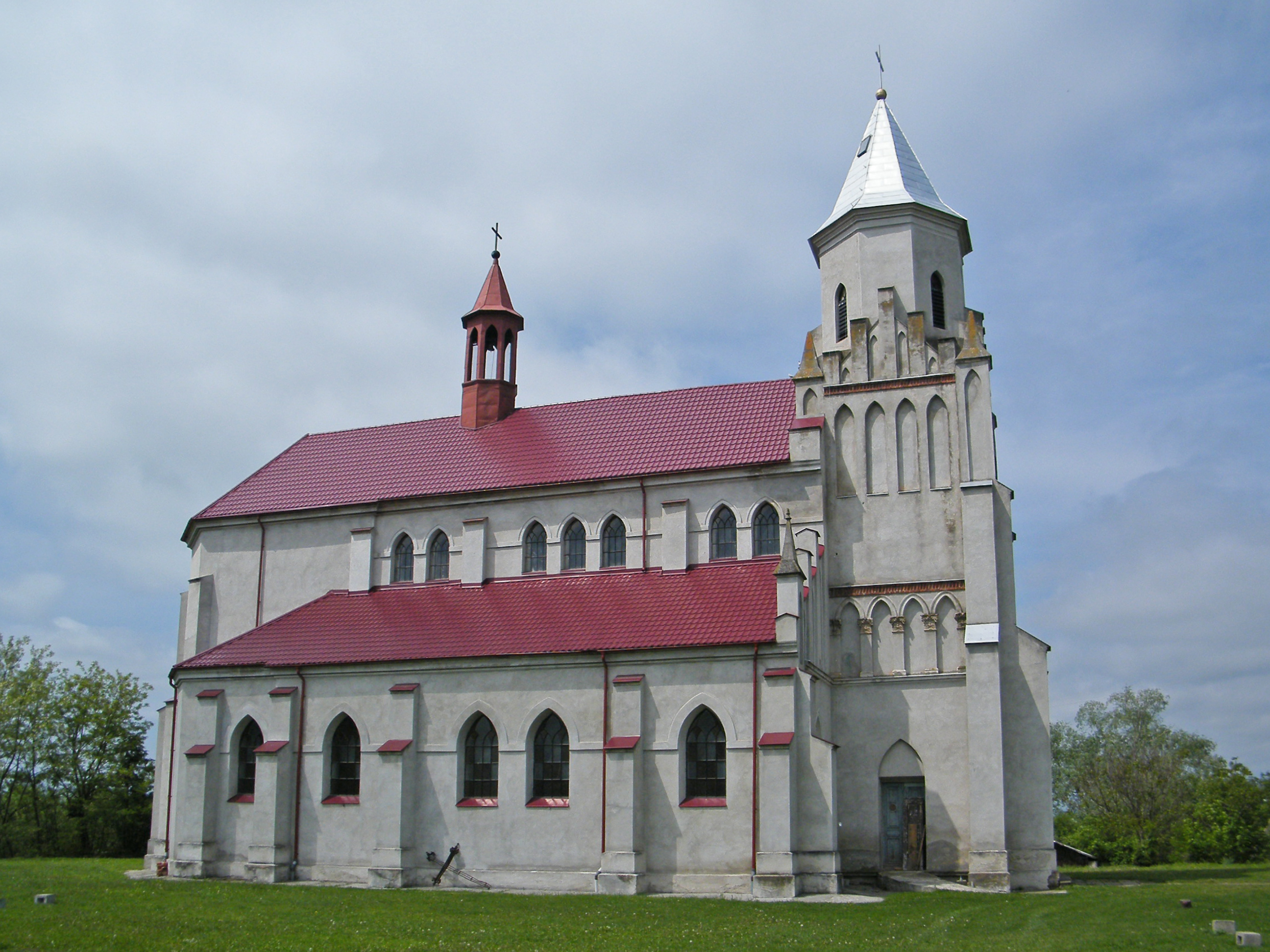 Католический костел